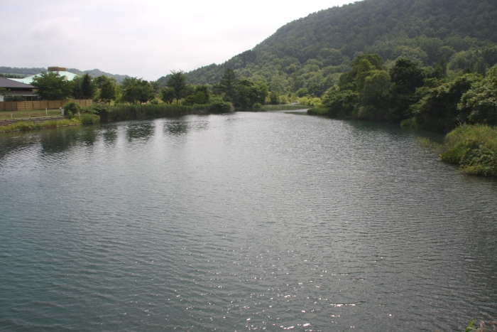 壮瞥川堰止湖の新山沼